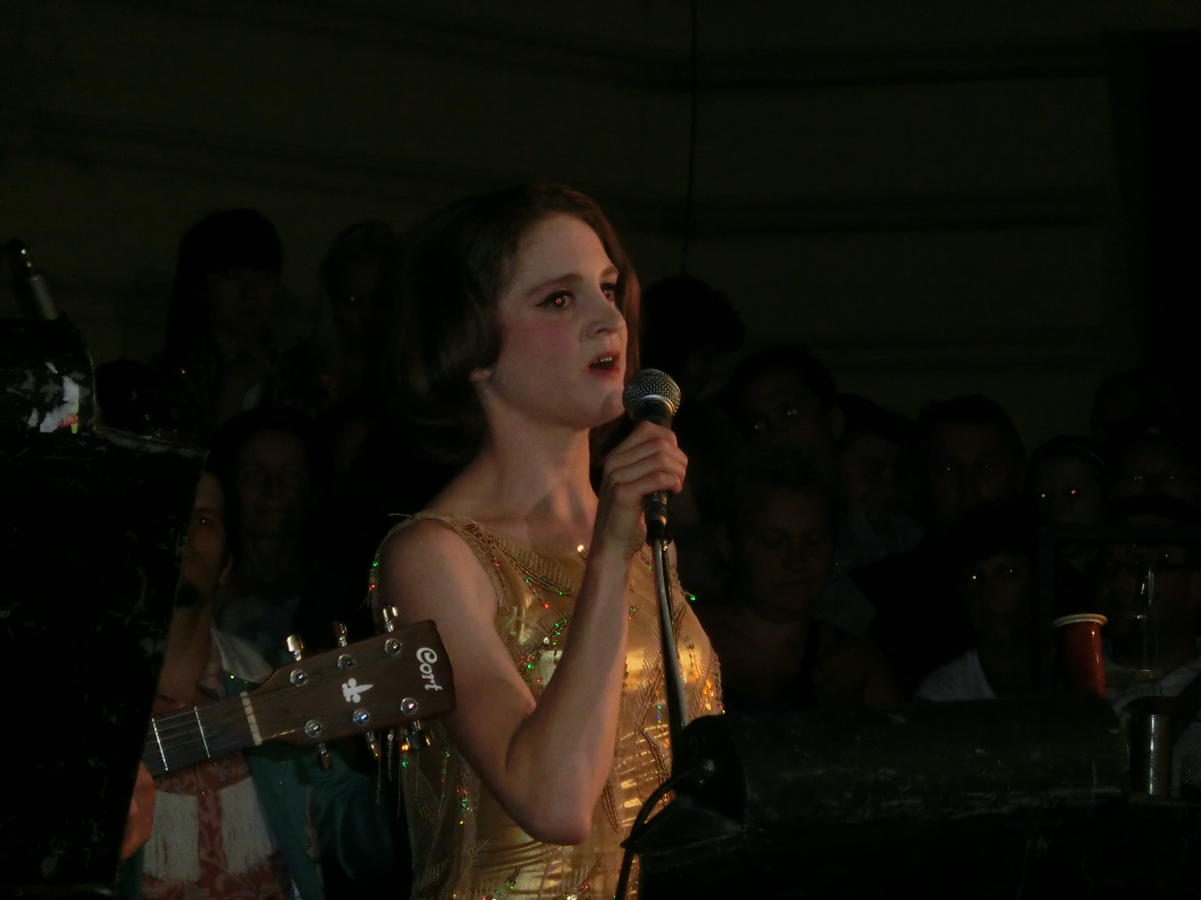 Toto je fotografie české herečky Pavlíny Štorkové, při koncertu skupiny Mastix 22.6.2013